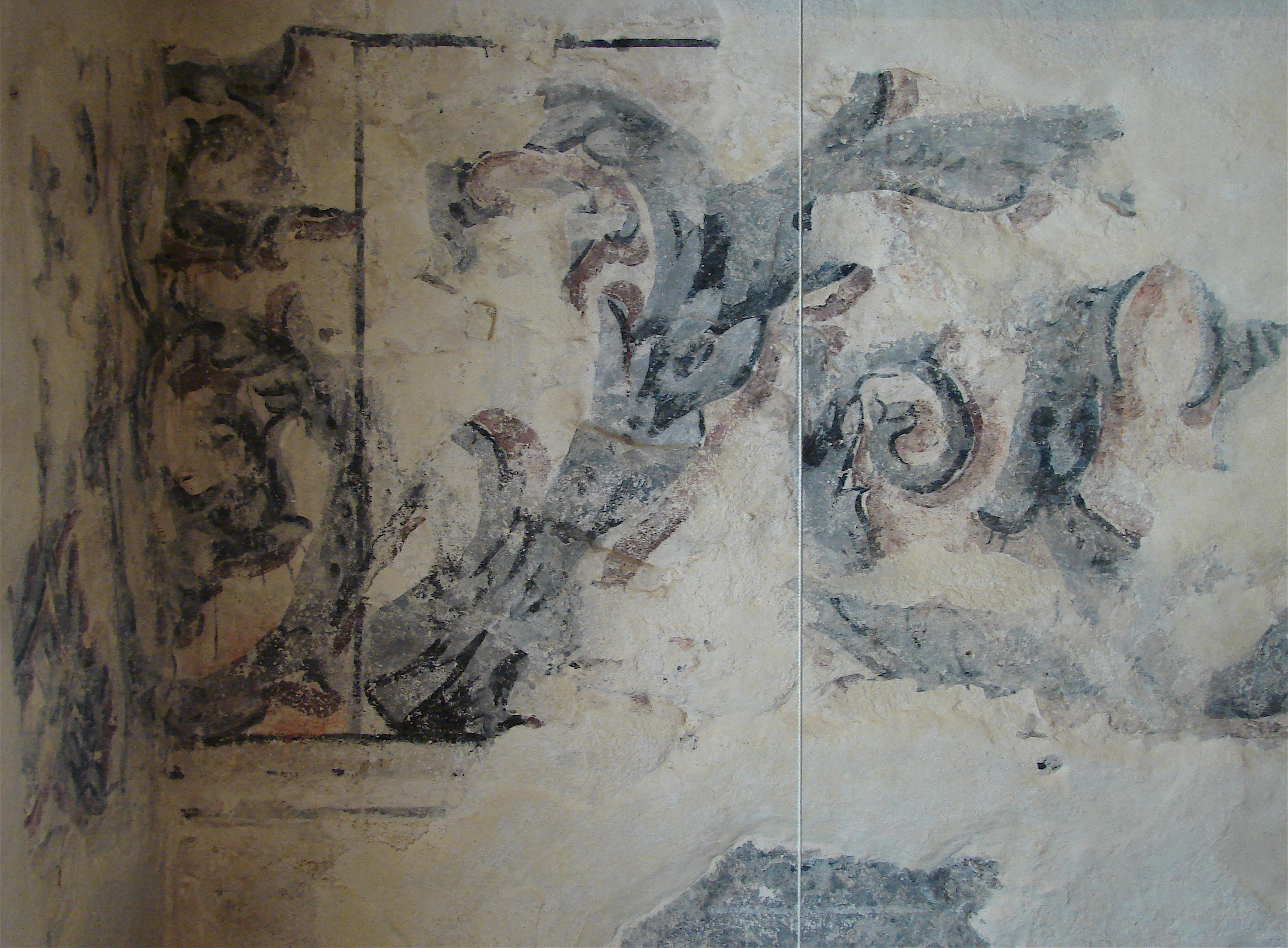 Mural painting from Tommerup, Tommarp Kungsgård, kalkmaleri